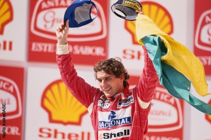 Ayrton Senna at Interlagos, 1993